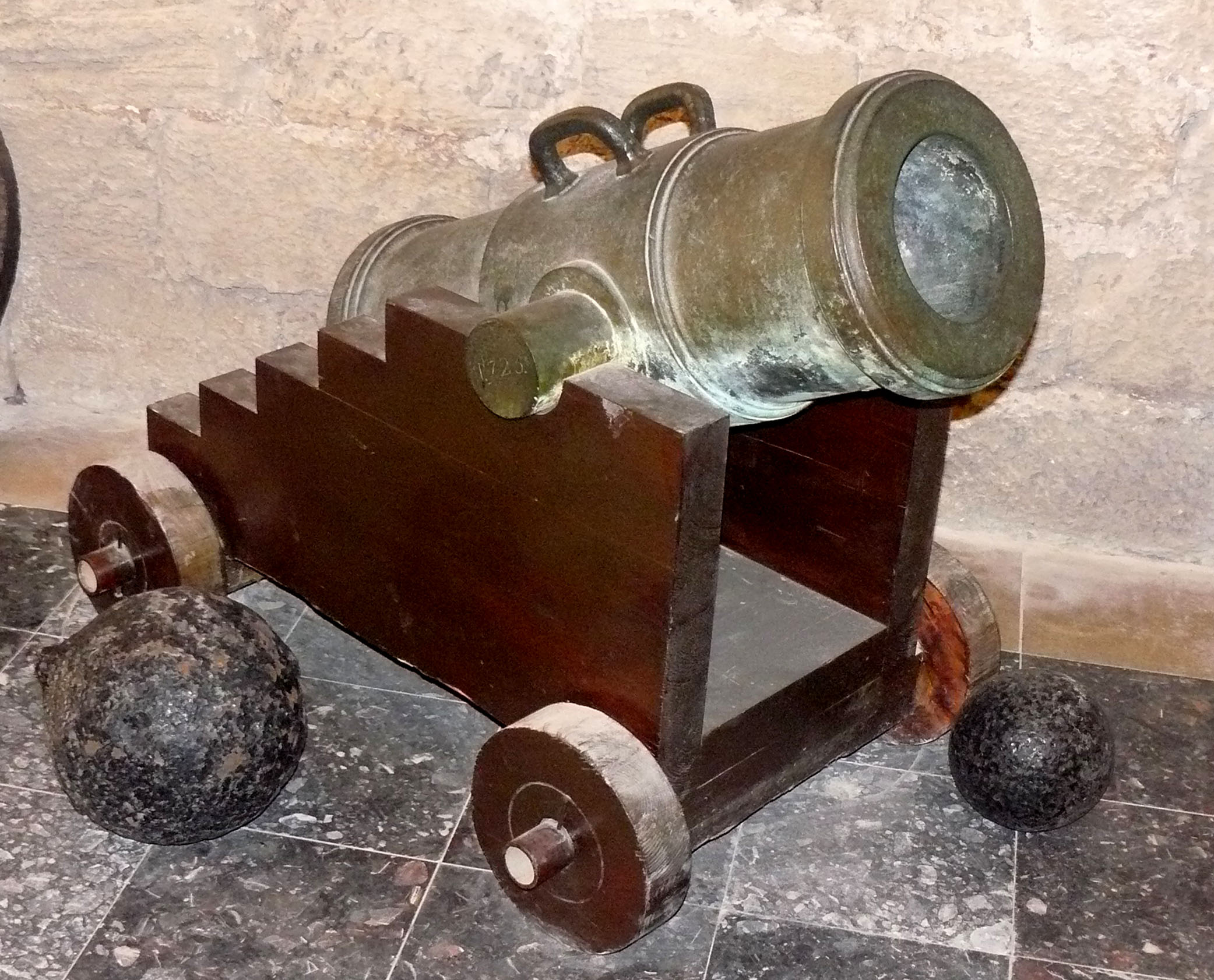 מרגמת ברונזה ממכלול כלי הנשק שהושלכו לים על ידי נפוליון במפרץ הדרומי בדור, מוצגת במוזיאון בית הזכוכית (המזגגה) בקיבוץ נחשולים